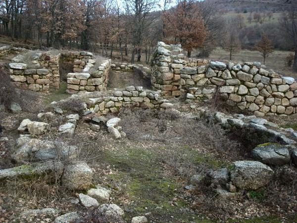 Santuario di Gremanu, Fonni NU